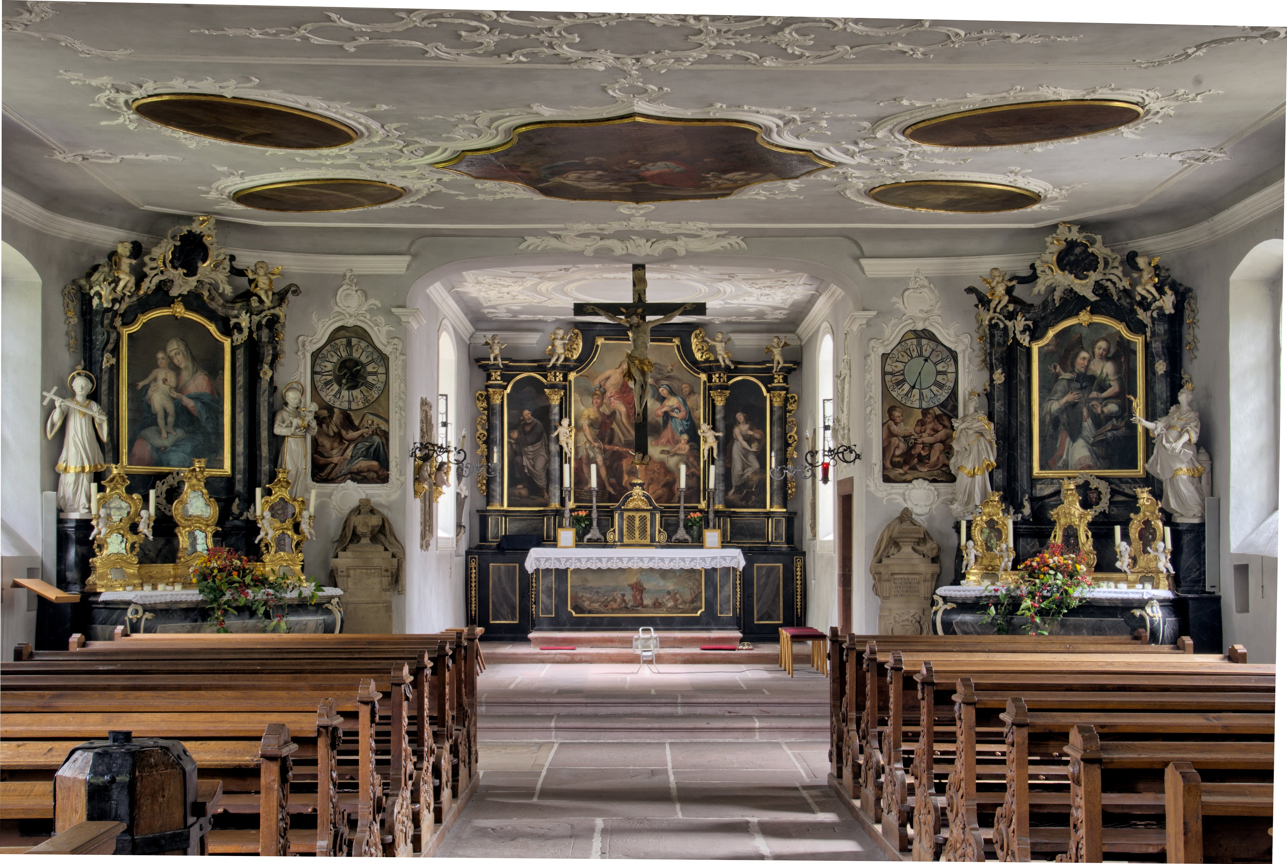 Bilder des Innenraums der St. Michaelskapelle auf dem alten Freidhof in Freiburg